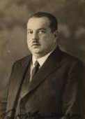 Benno Landsberger (1890-1968), německý asyrolog